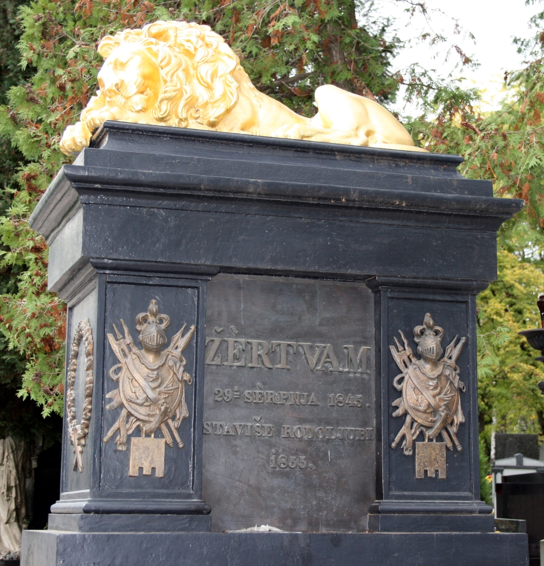 spomenik Srpanjskim žrtvama na Mirogoju u Zagrebu, Hrvatska